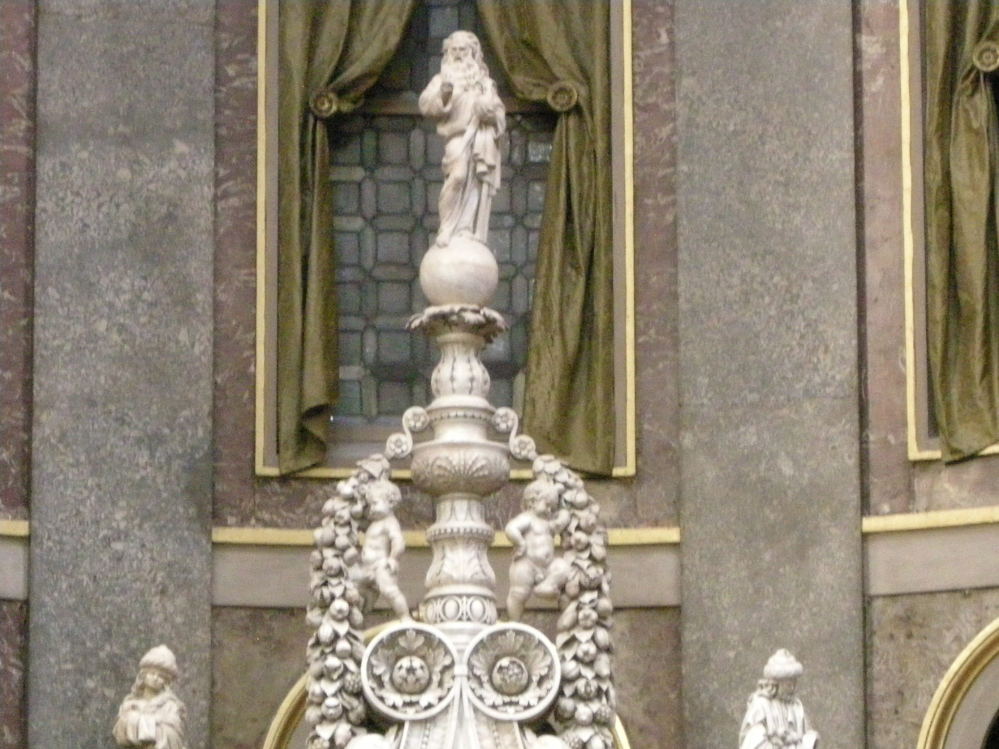 San domenico, bologna, interno, 05